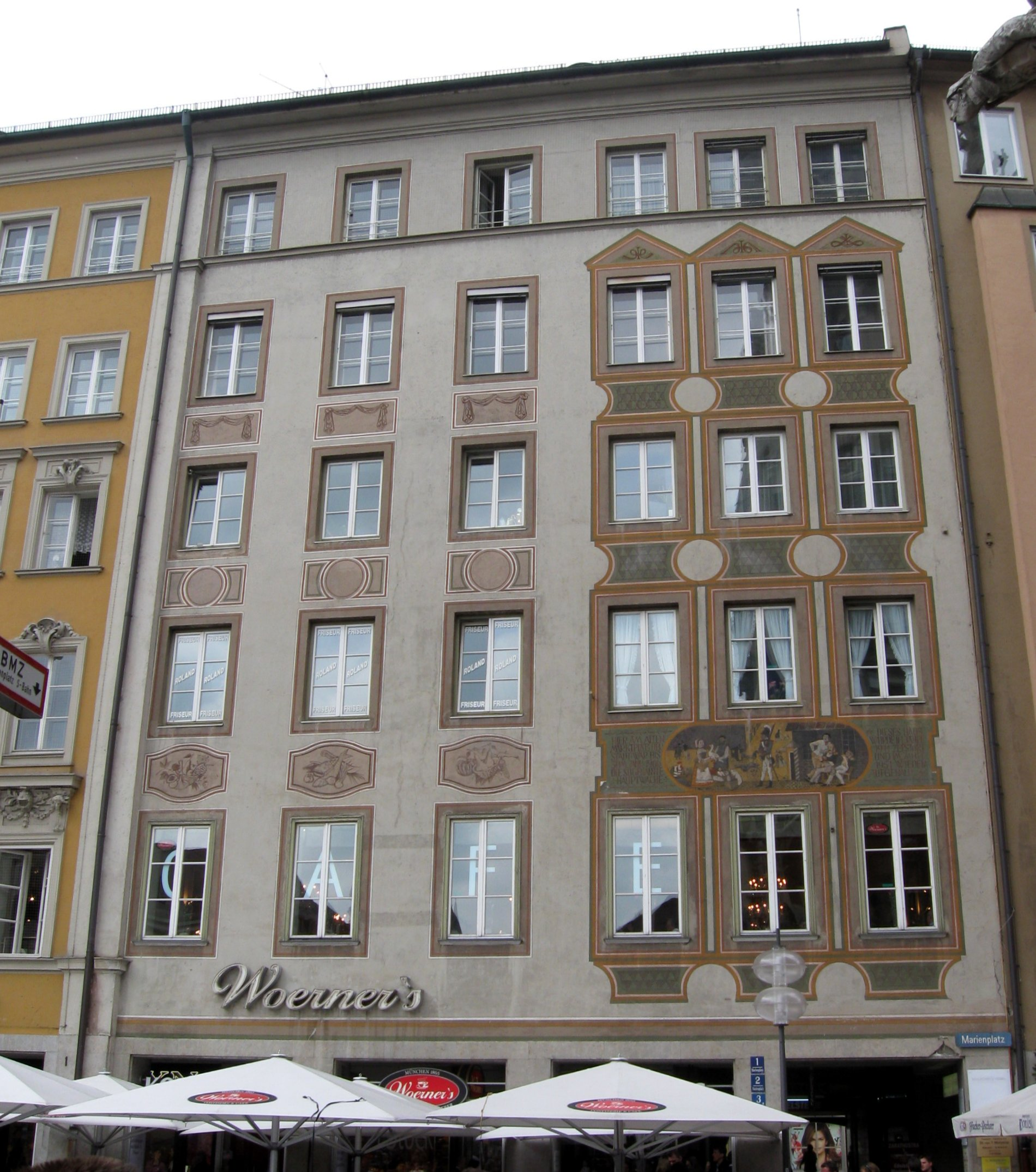 Marienplatz 2; Wohn- und Geschäftshaus, sechsgeschossiger Putzbau mit Fassadenmalerei, seit 1865 zu Nr. 1 gehörig, um zwei Geschosse aufgestockt, 1870, beim Wiederaufbau neugestaltet, 1951